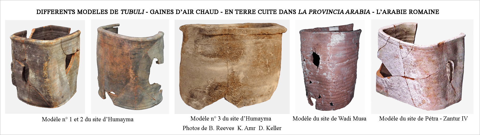 Assemblage de différents conduits d’air chaud dans l’Arabie romaine.